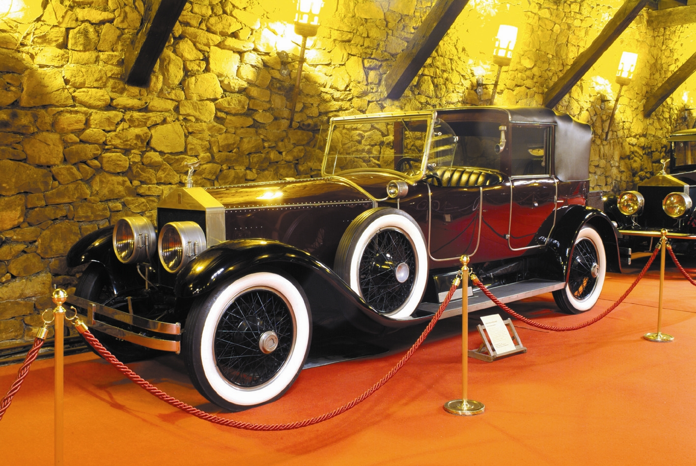 En el museo están presentes todas las décadas del siglo XX, desde un Allen Runabout de 1899 hasta un RR Silver Spur de 1990 pasando por un RR Silver Ghost Apline Eagle de 1914.